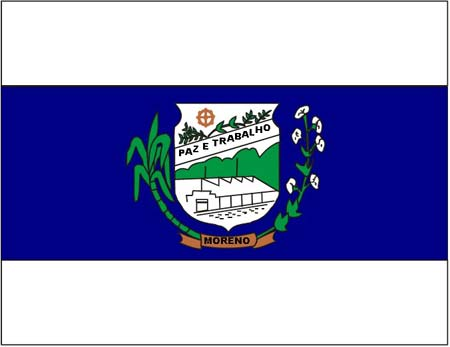 Bandeira do Município de Moreno Pernambuco